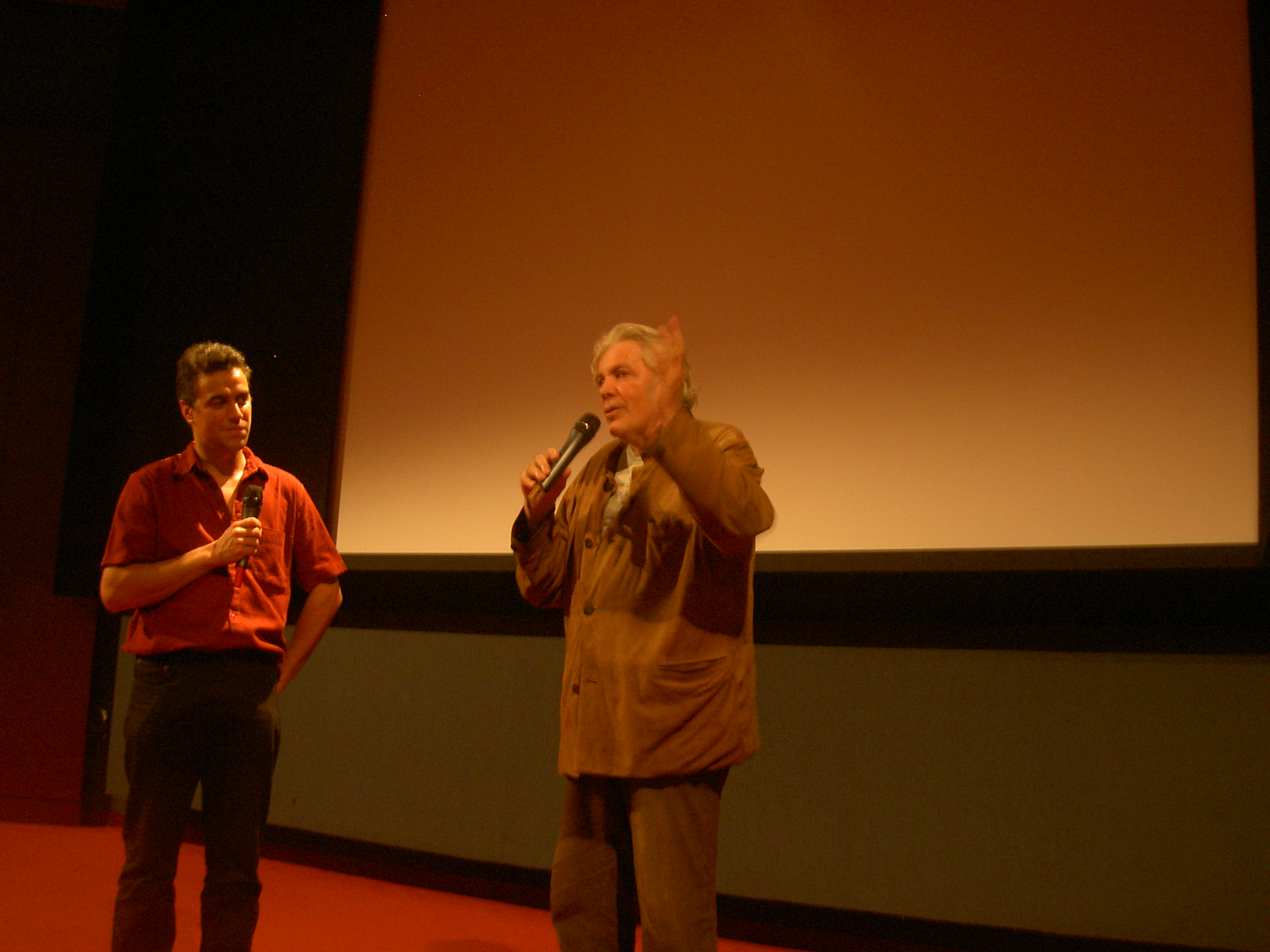 Pierre Barouh au Forum des images à Paris